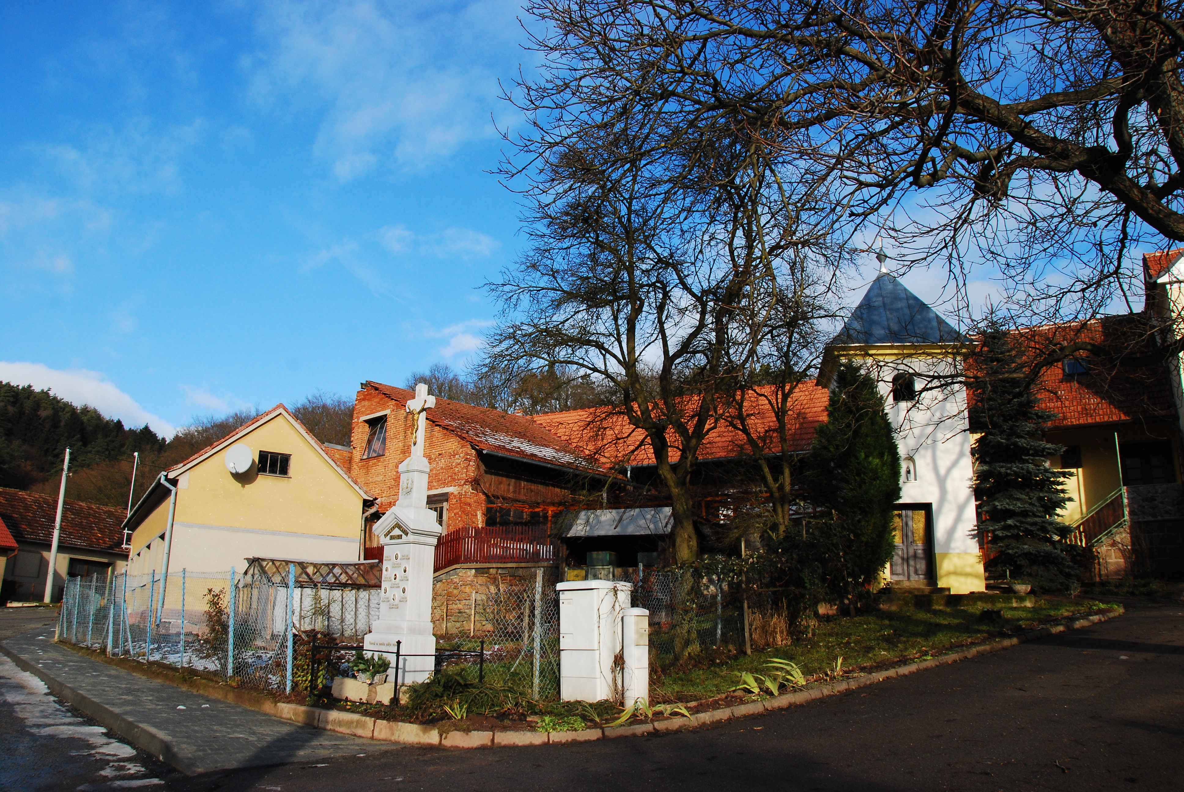 Lubě - Kaple Narození Panny Marie a křížek u cesty